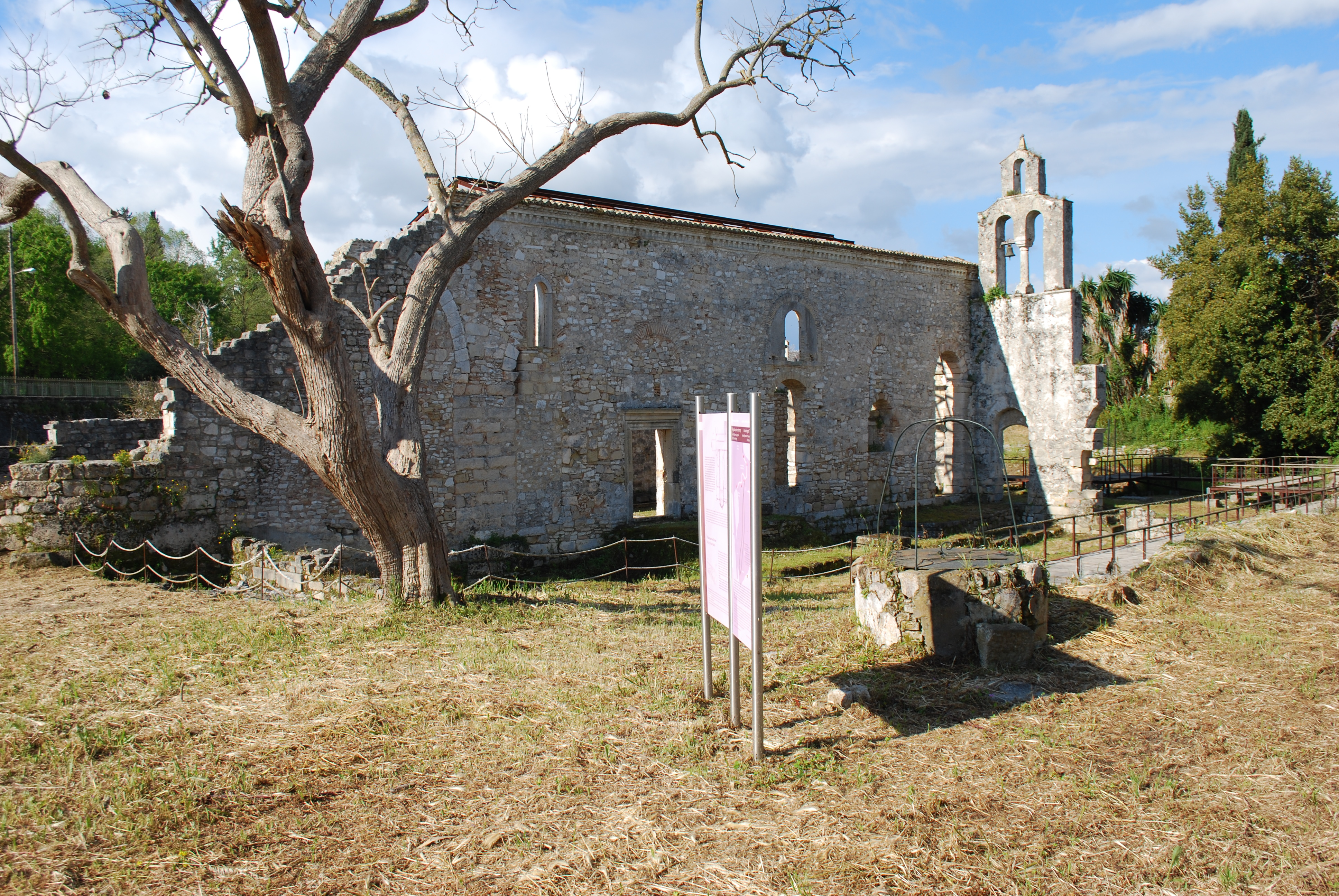 Vue de Corfou.